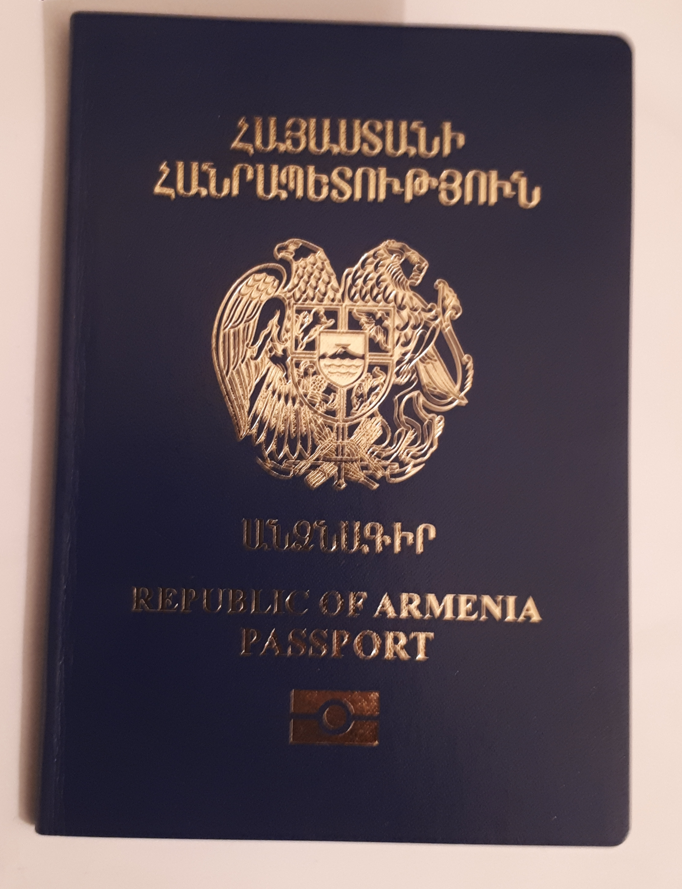 ՀՀ անձնագիր